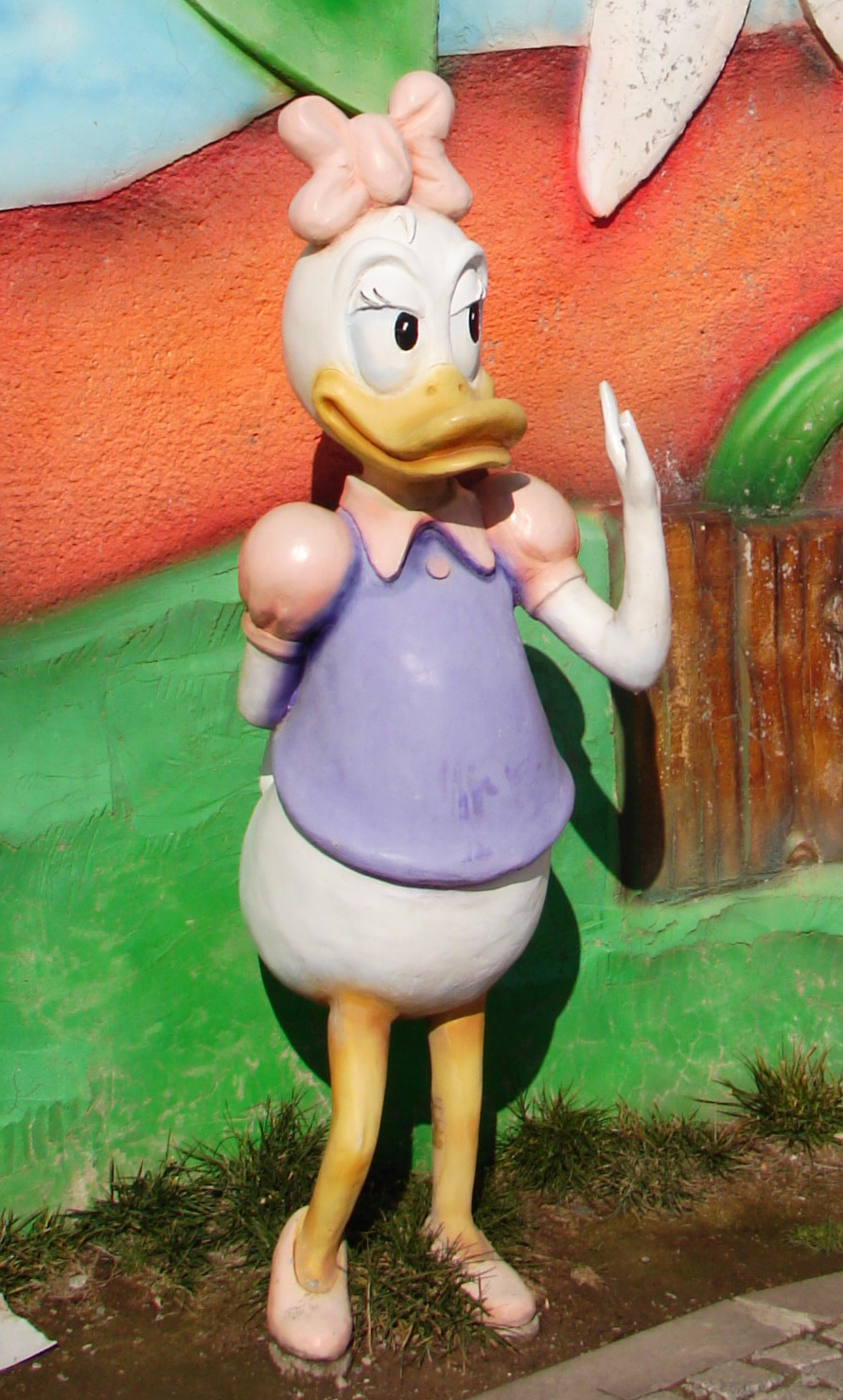 Ankara Amusement Park